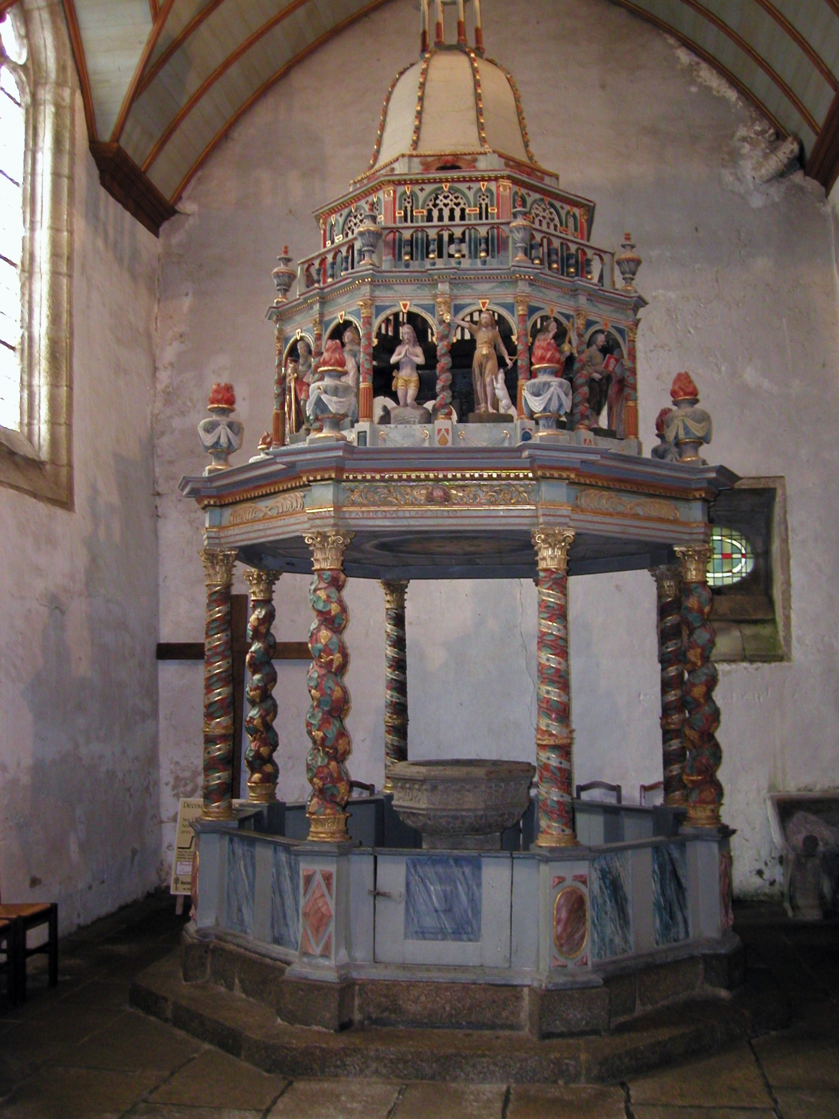 Taufbecken in der Kirche von Lampaul-Guimiliau